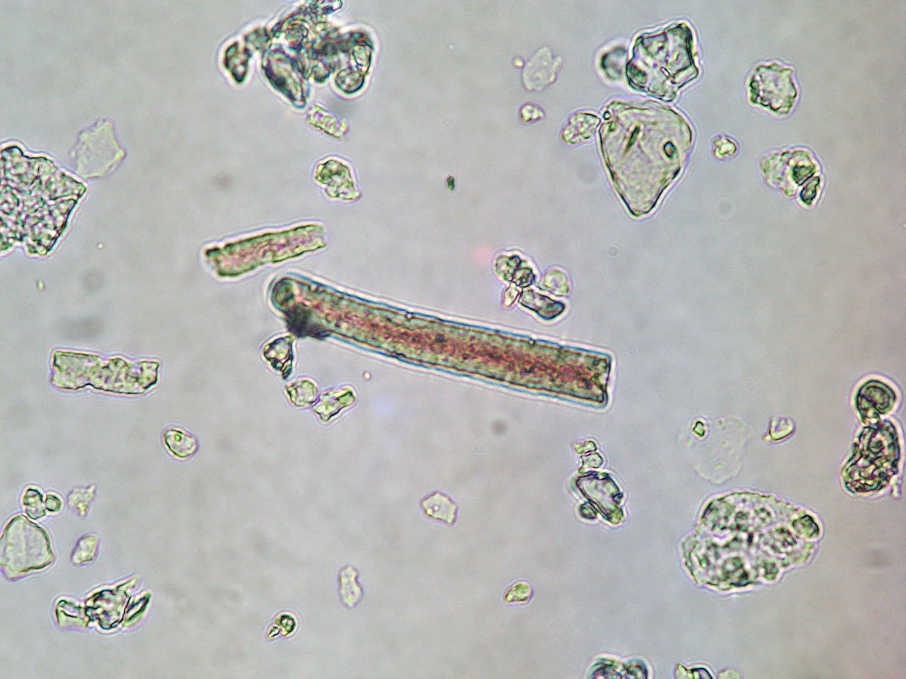 FR:Description Photographie au microscope d'un phytolithe (cellule allongée) Photographe: Henri-Georges NATON Préparation des phytolithes : Claire Delhon Source: importé par le photographe Licence: GFDL-self